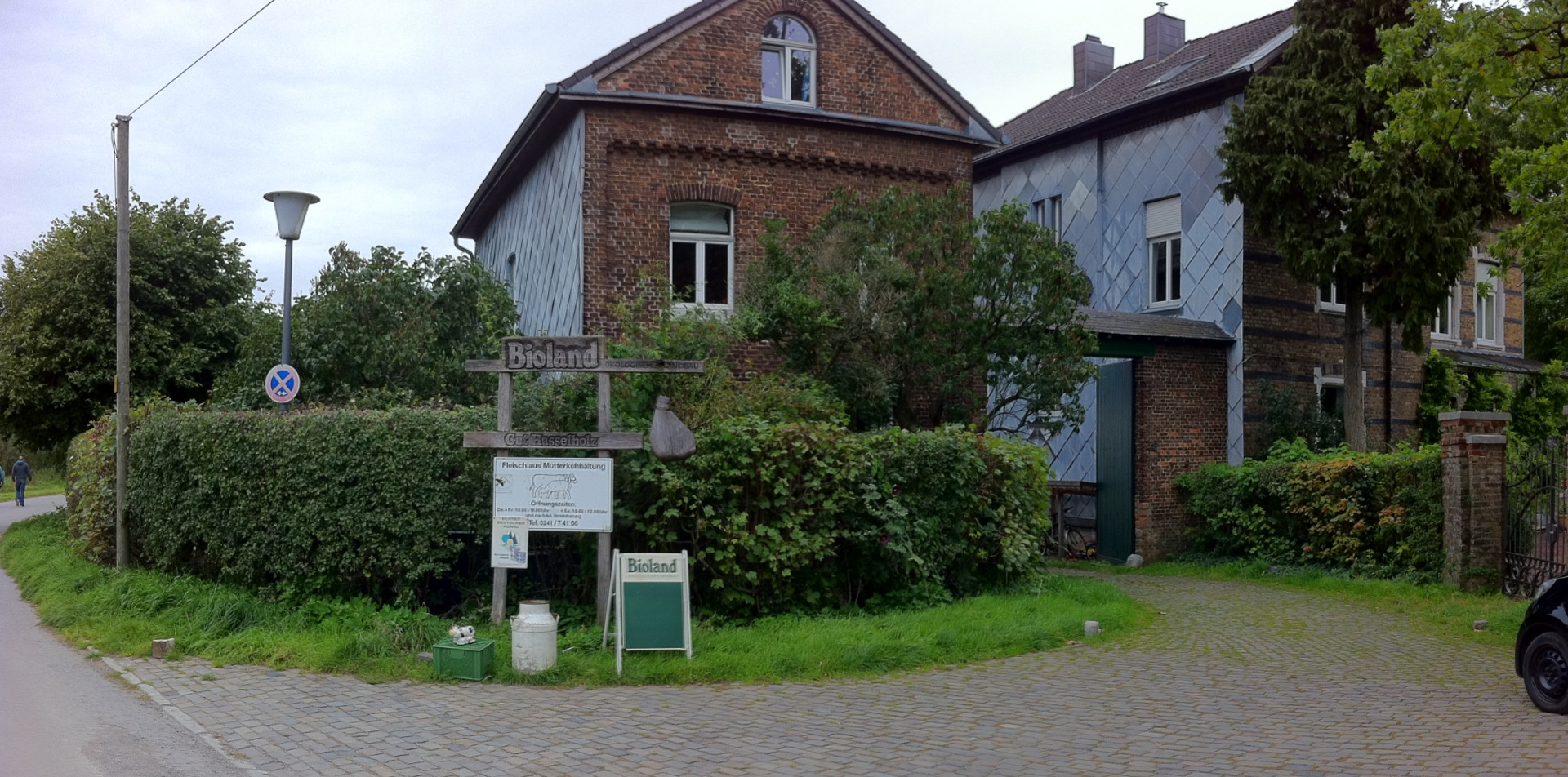 Gut Hasselholz